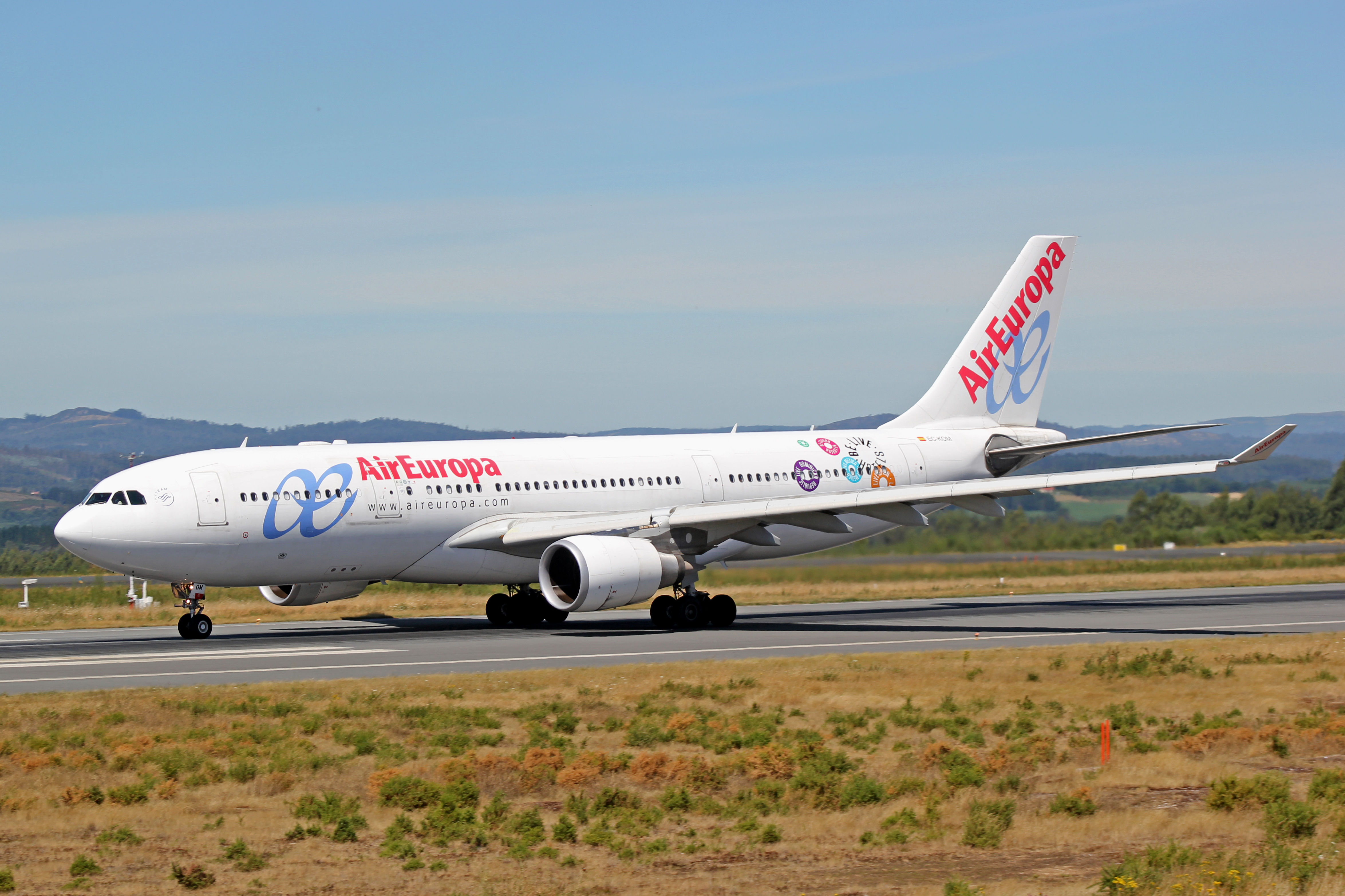 Airbus A330 de Air Europa no aeroporto de Santiago de Compostela.